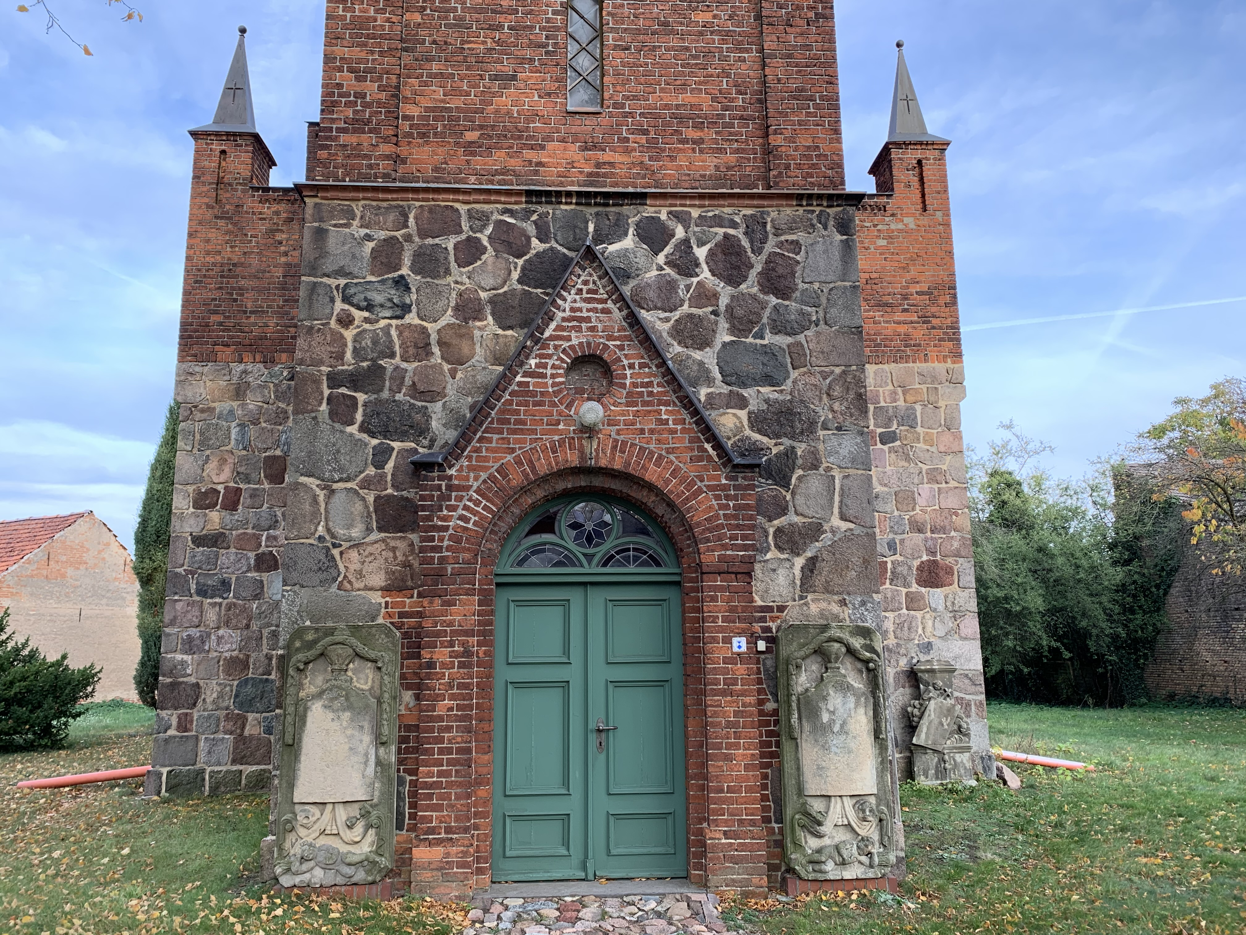 Die Dorfkirche Petkus ist eine spätromanische Saalkirche in Petkus, einem Ortsteil der Stadt Baruth/Mark im Landkreis Teltow-Fläming in Brandenburg